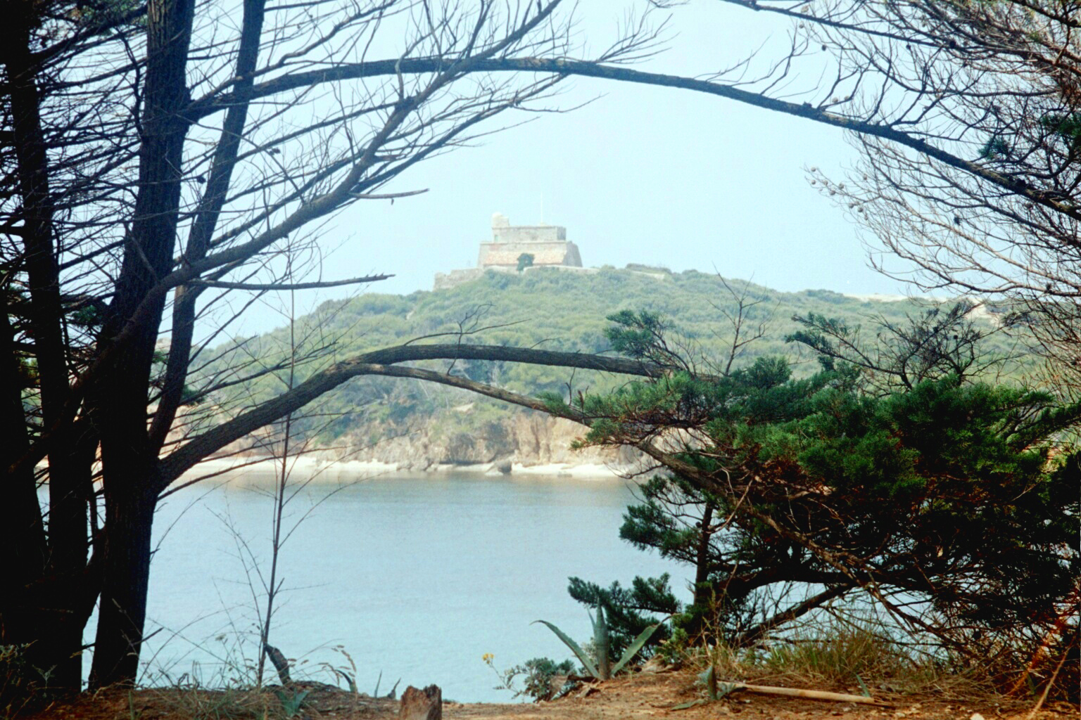 Vue vu Porquerolles